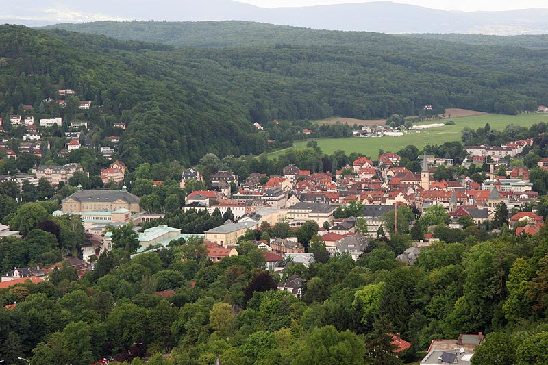 Blick von der Ruine Bodenlaube auf Bad Kissingen in NNW-Richtung